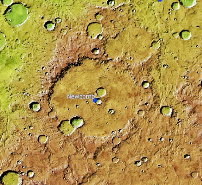 Cráter marciano Newcomb. (Imagen IAU/USGS/Goddard/A SU/USGS)